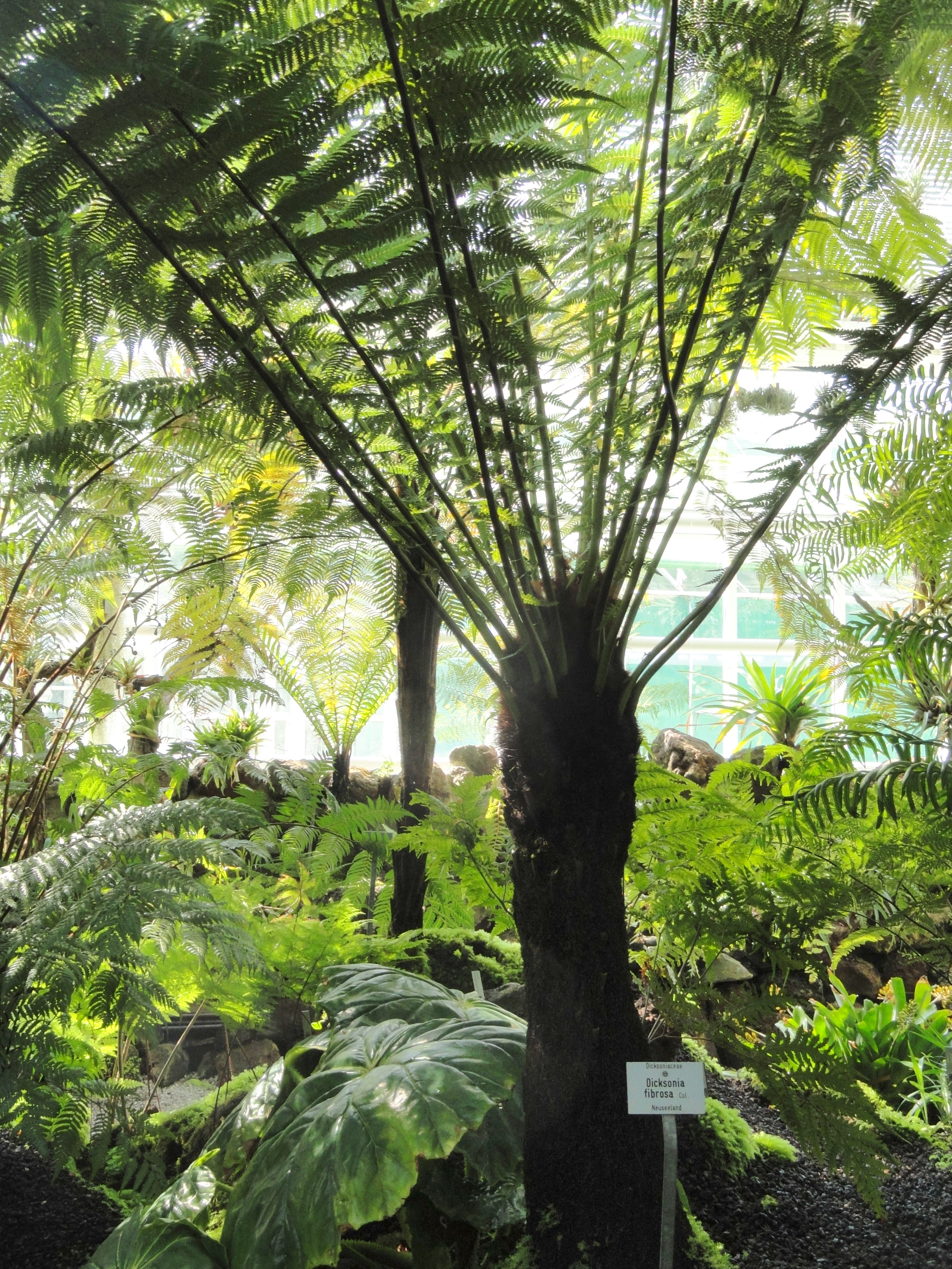 Dicksonia fibrosa specimen in the Botanischer Garten München-Nymphenburg, Munich, Germany.